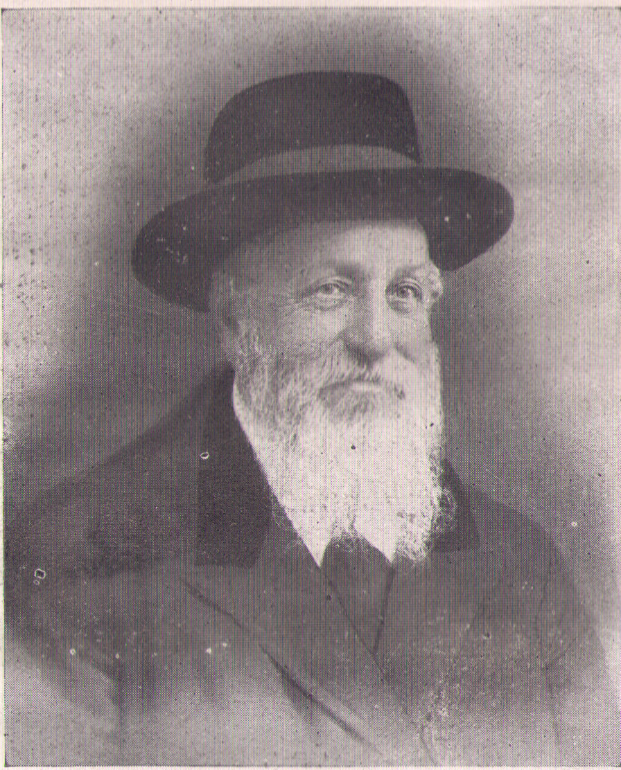 הרב"ז שפרן זצ"ל